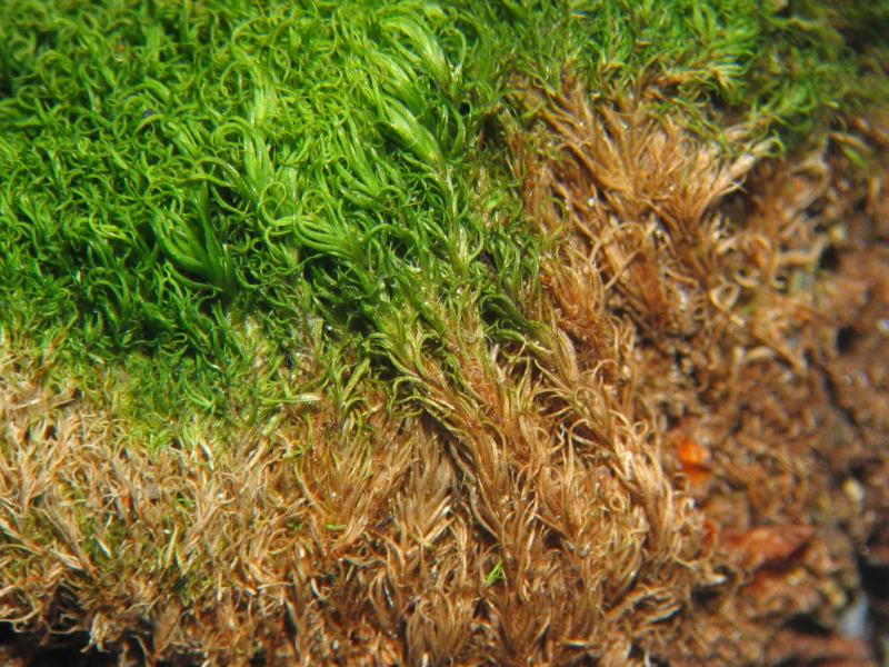 Bleiches Lippenbechermoos (Dicranum montanum), Habitus, Seitenansicht